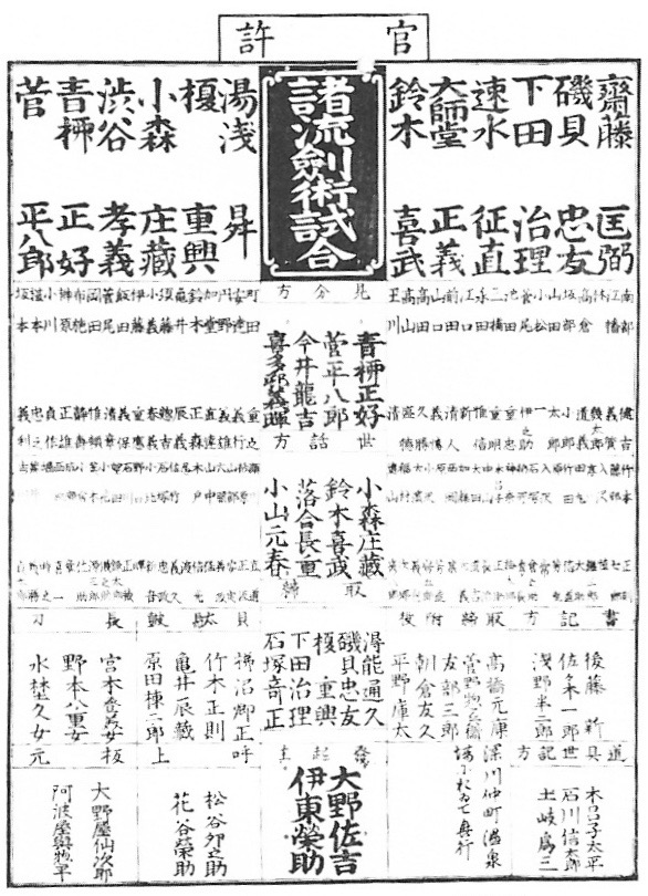 大野佐吉が明治時代に開催した剣術試合の番付